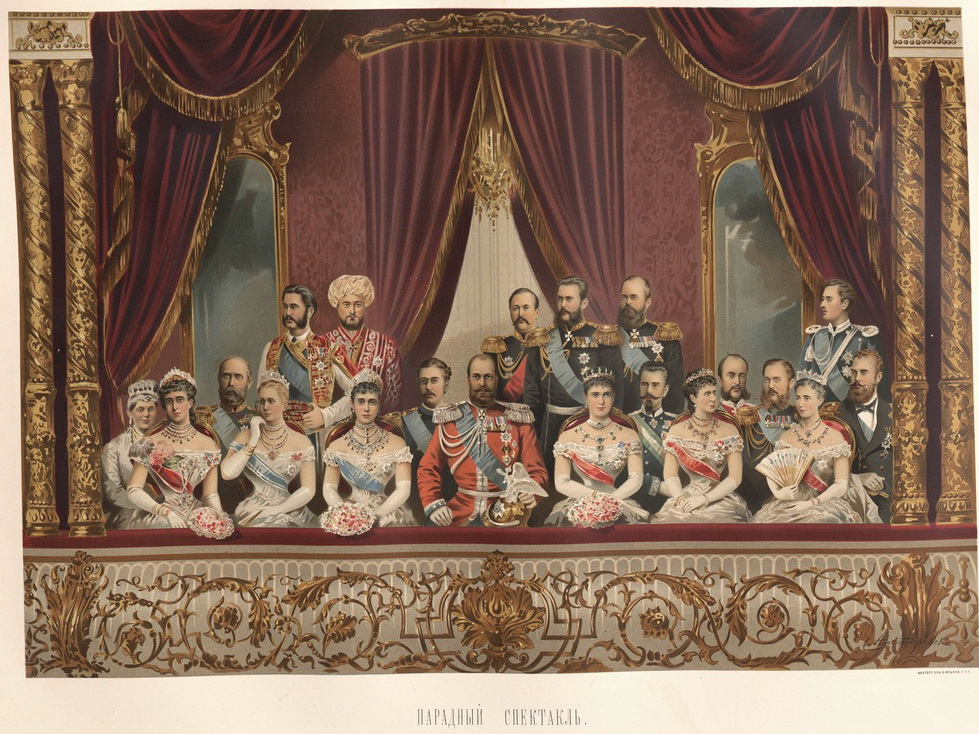 Парадный спектакль в московском Большом театре по случаю священного коронования императора Александра III и императрицы Марии Федоровны в мае 1883 года, худ. Александровский